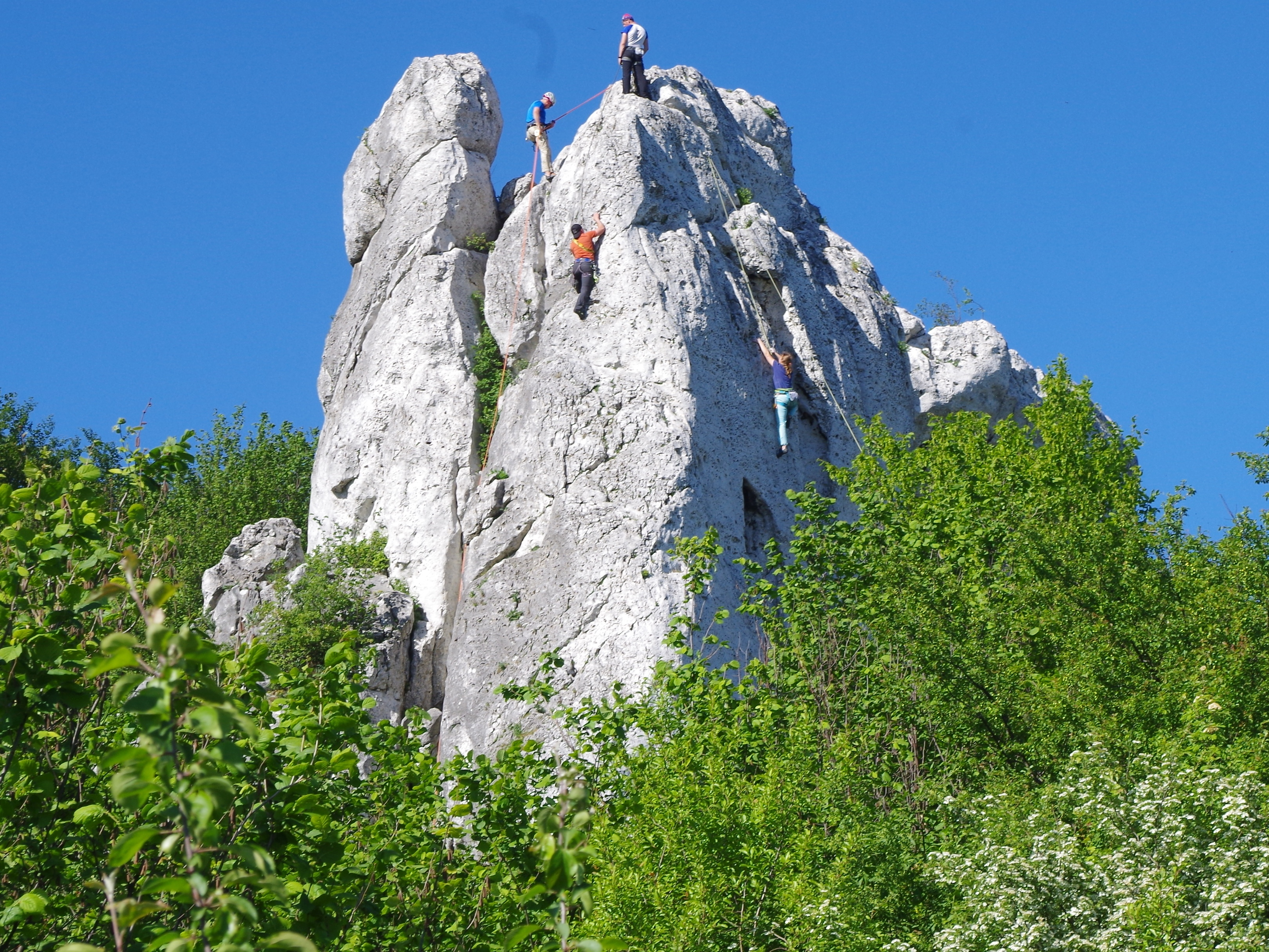 Wielka Baszta w Skałach Rzędkowickich